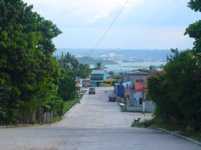 Calles de San Andres, El Petén, Guatemala.